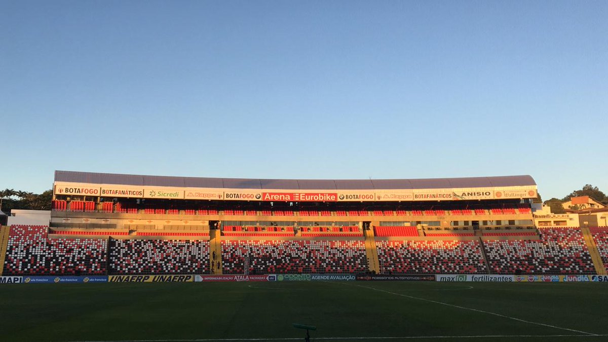 Com uma estrutura tão grandiosa quanto a história do clube e capacidade para até 15 mil pessoas, a Arena Eurobike veio para revolucionar a vida em Ribeirão Preto com bares, camarotes, suítes – além de uma unidade do Hard Rock Café, do Seo Tibério, novo bar da Cervejaria Walfänger e do Vilinha Kids, um espaço kids para os pequenos torcedores – e um lugar perfeito para shows e outros eventos. Totalmente novo e cheio de exclusividades, o Santa Cruz agora tem uma arena multiuso para dar ainda mais orgulho ao torcedor botafoguense.